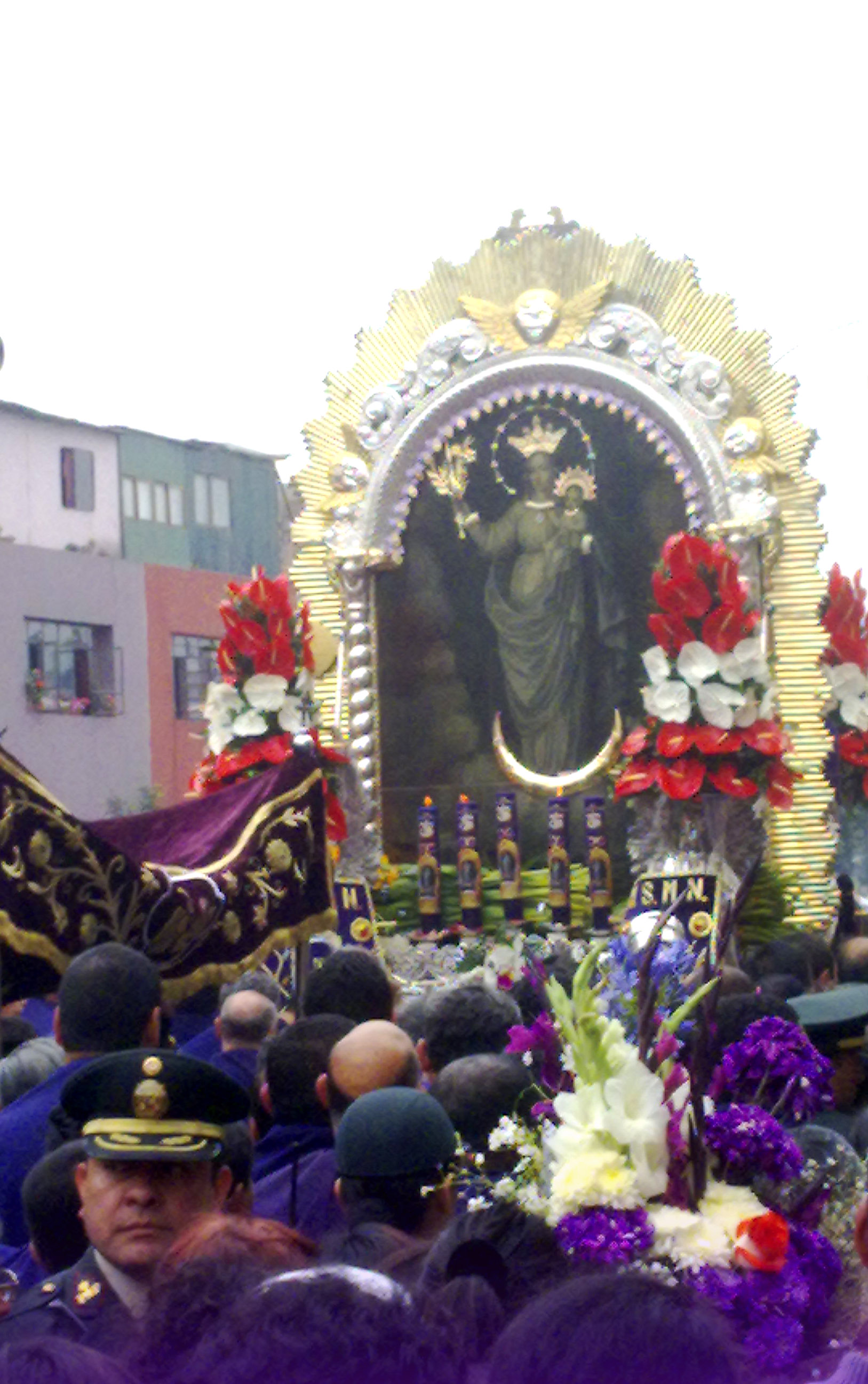 Virgen de la Nube, ubicado en la parte posterior del Anda.